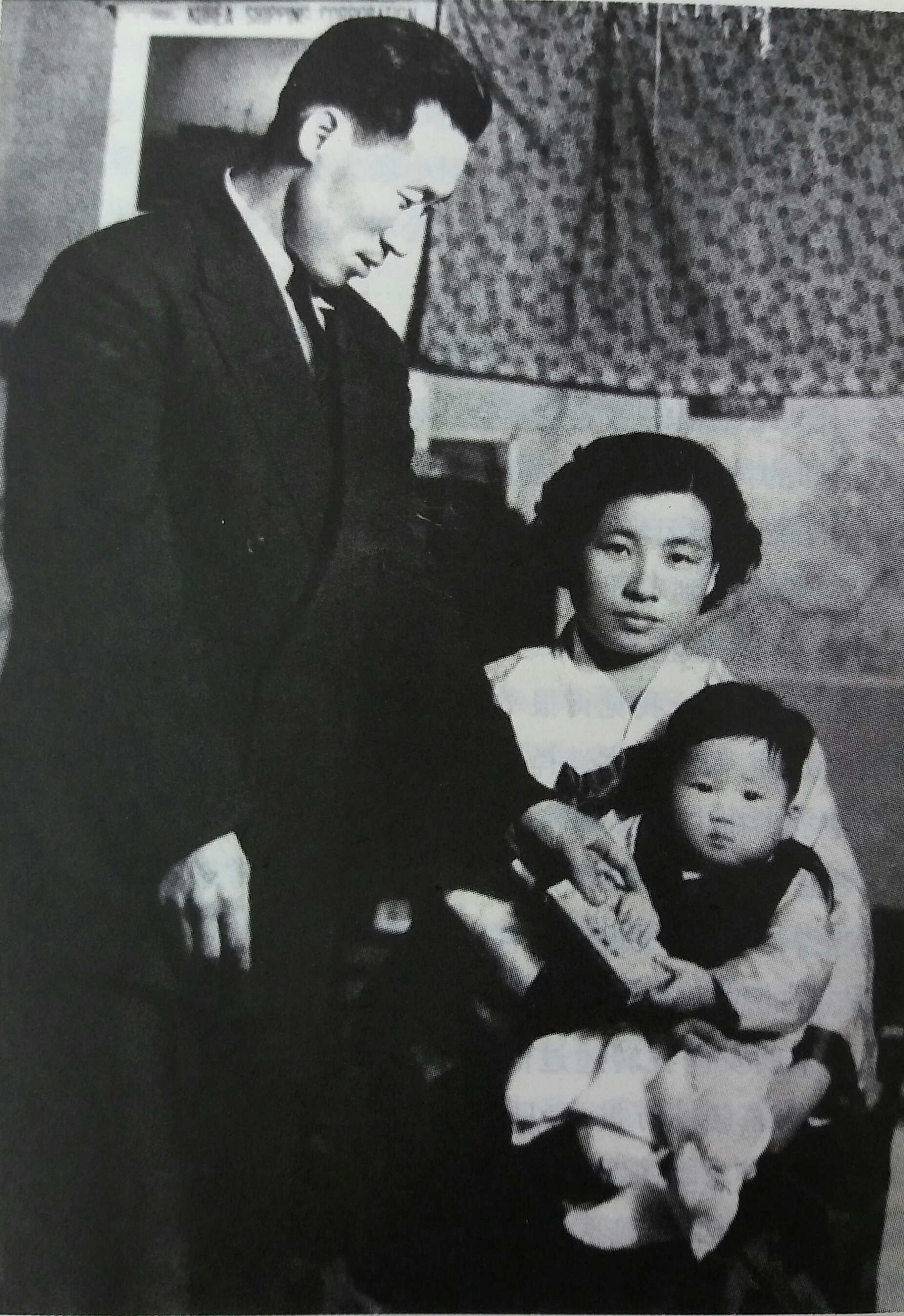 郑周永夫妇与儿子梦允